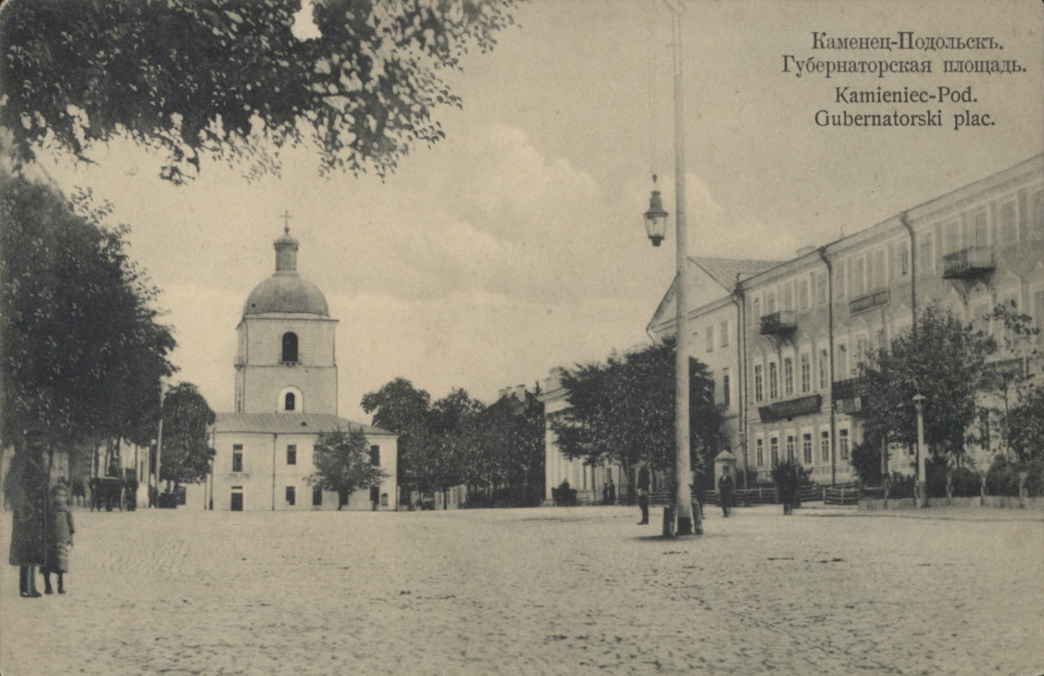 Церква Св.Іоана Предтечі: Церква Св.Іоана Предтечі.Церква Св.Іоанна Предтечі – споруда 15 – 16 ст.До 1878 р. була соборною.